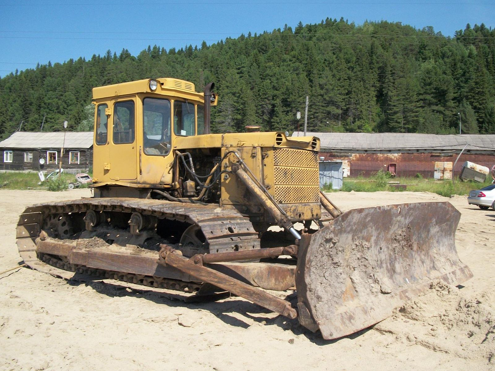 Трактор Т-170Б г. Ханты-Мансийск